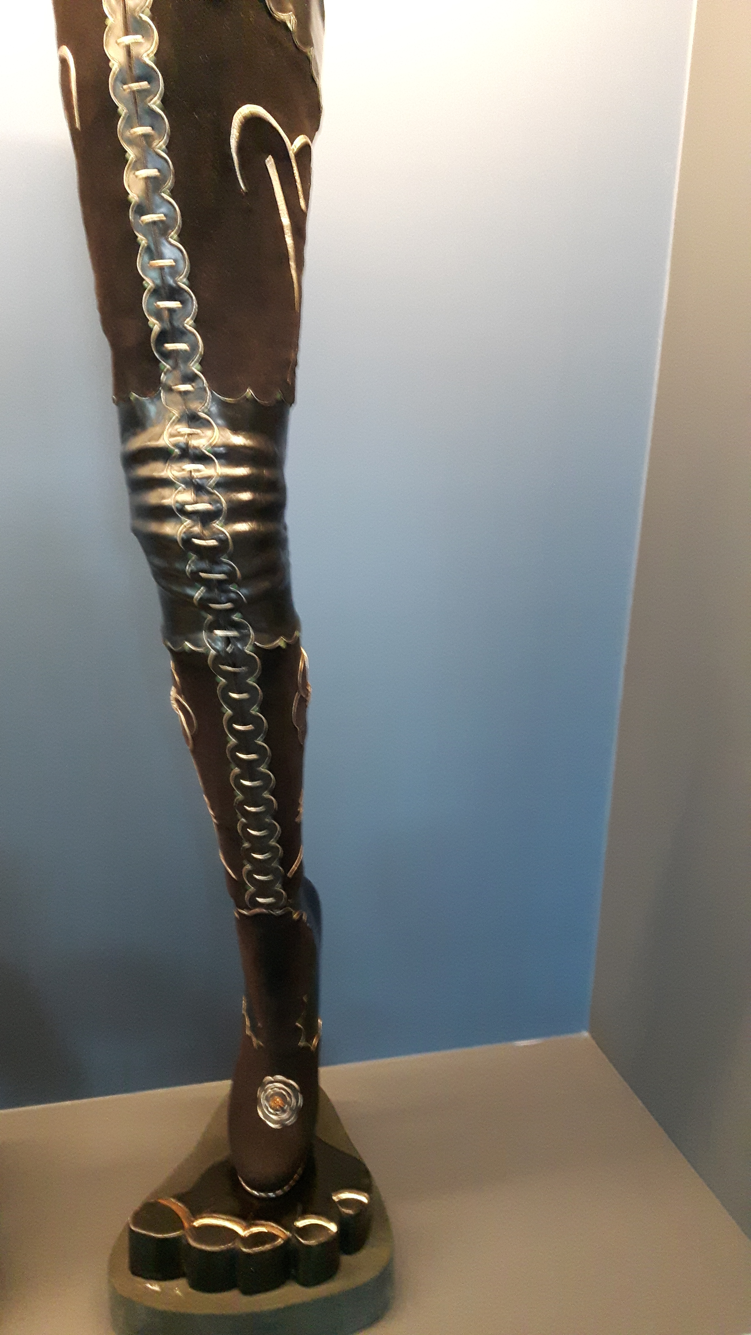 Schoenen schoenmuseum